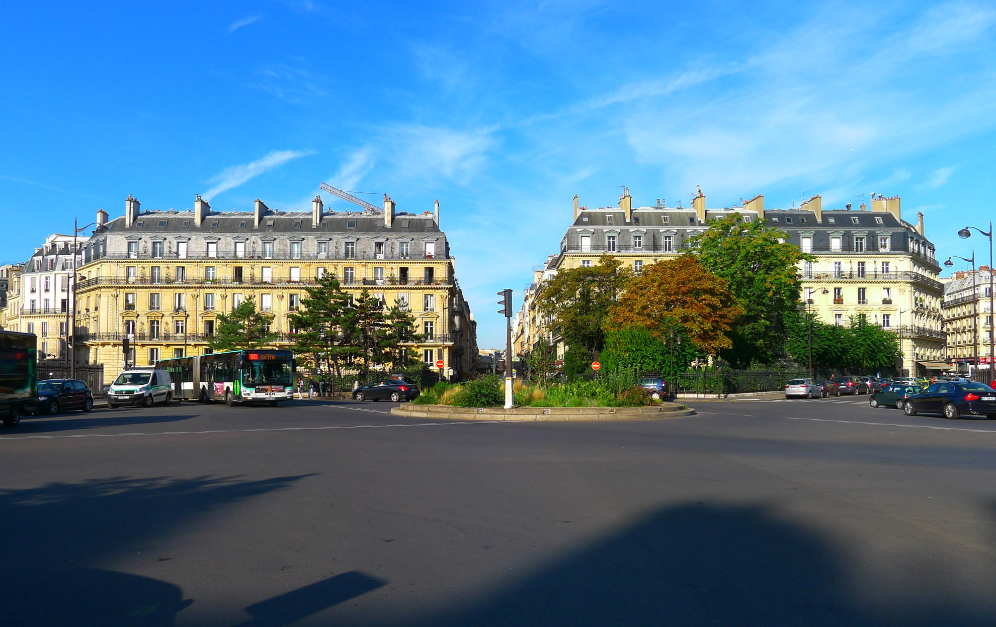 Place de l'Europe - Paris VIII